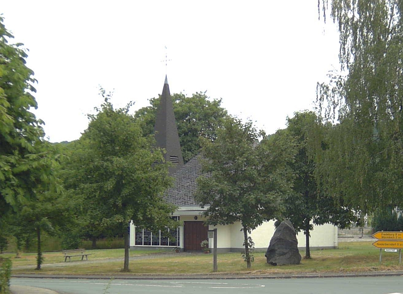 Kapelle in Felbecke (Schmallenberg), Germany.